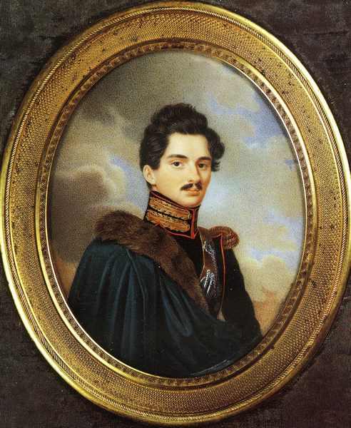 Николай Онуфриевич Сухозанет (1794-1874)